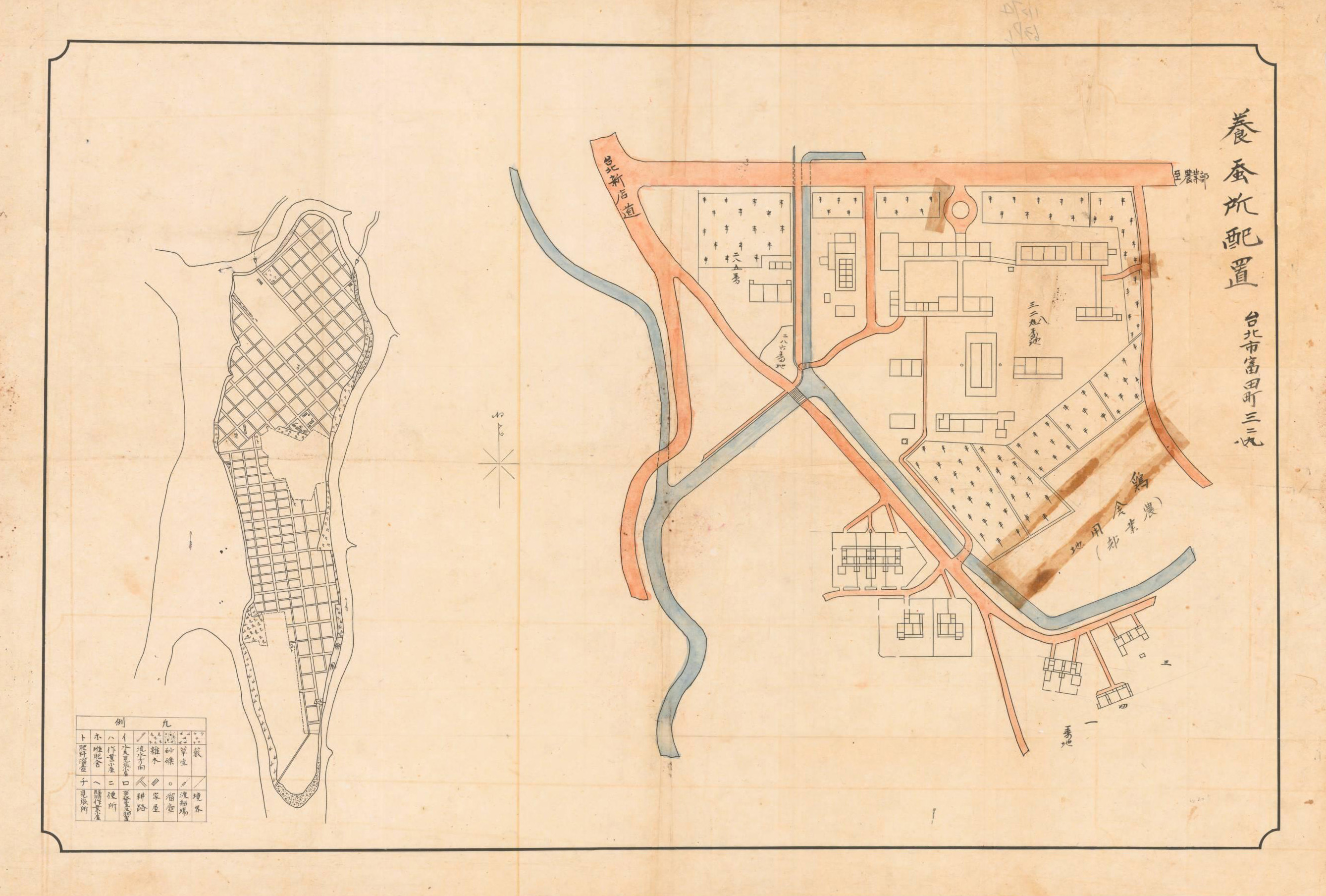 養蠶所位於台北市富田町，原址為現今的大安國中。圖中可見養蠶所廳舍和宿舍。